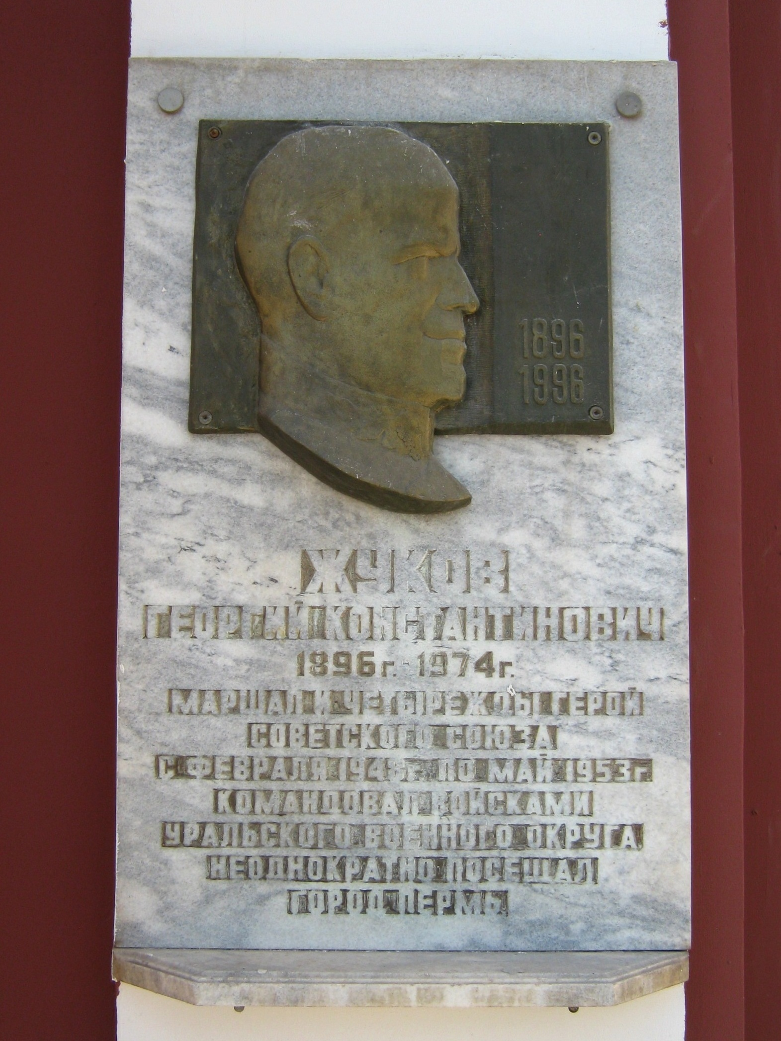 Мемориальная доска Жукову на доме офицеров в Перми